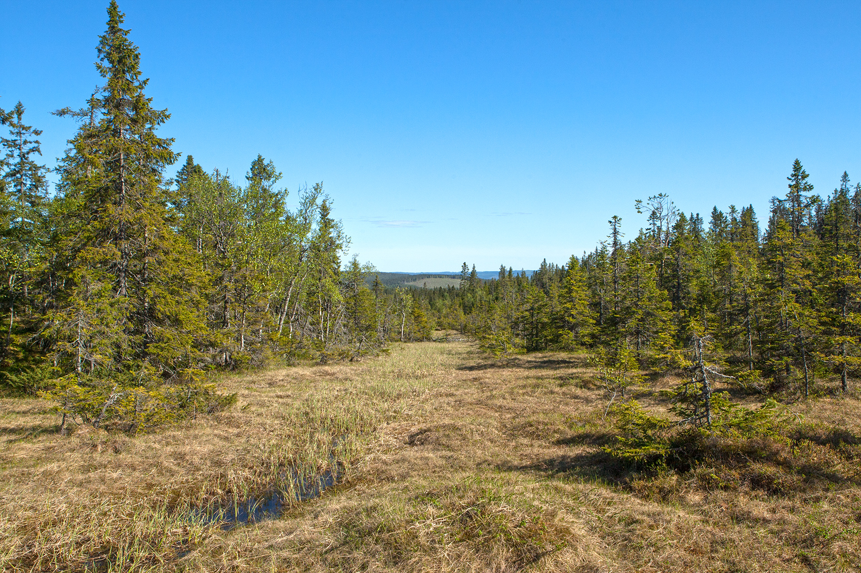 En av många myrar i Kålhuvudets naturreservat.